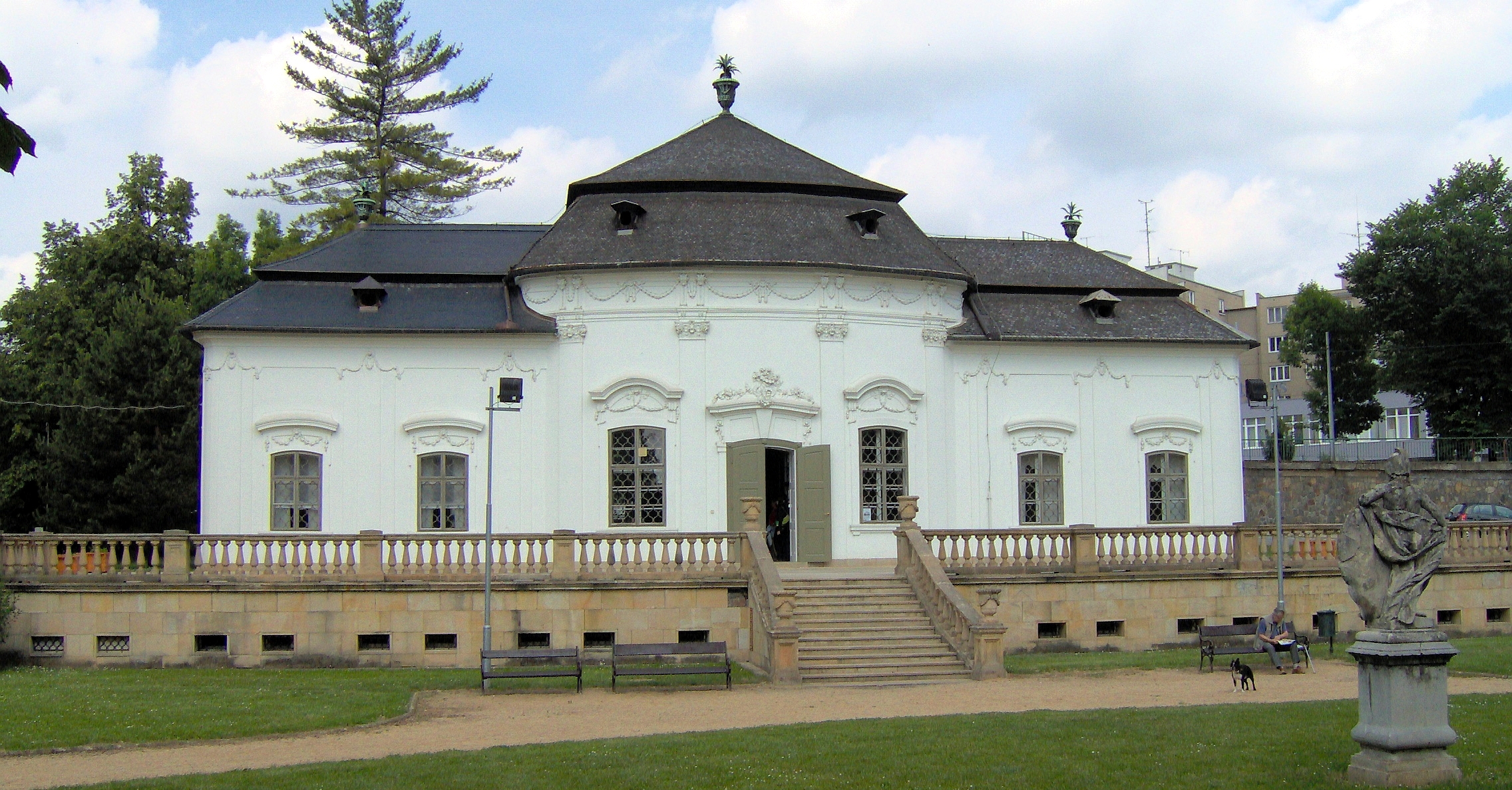 Zámeček Mitrovských v Brně nedaleko Mendlova náměstí